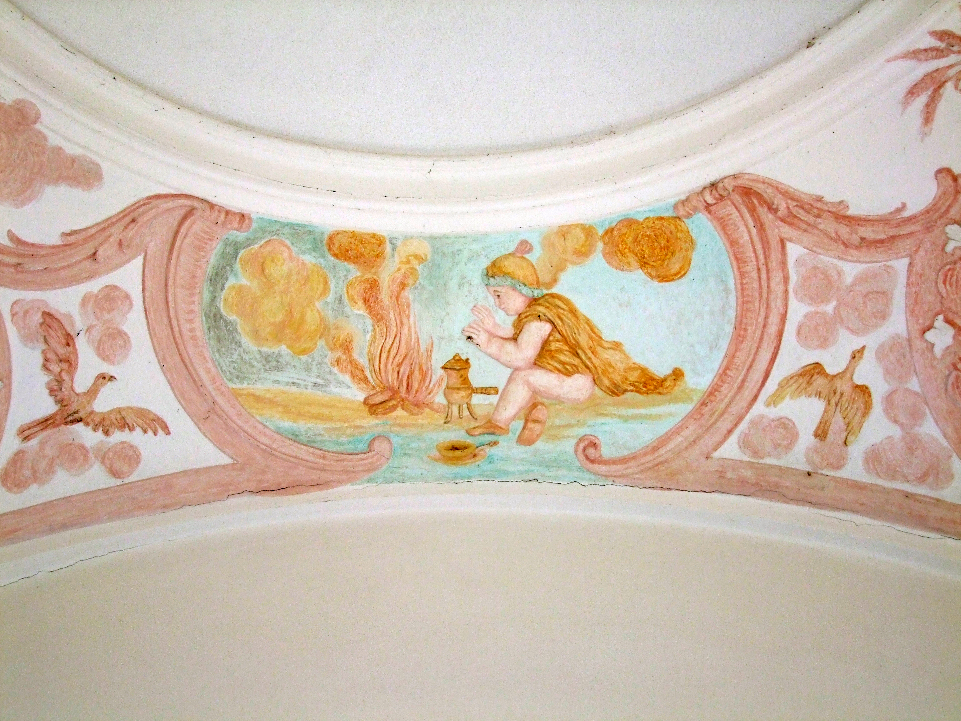 Stuck von Dominikus Zimmermann, Motiv:Winter